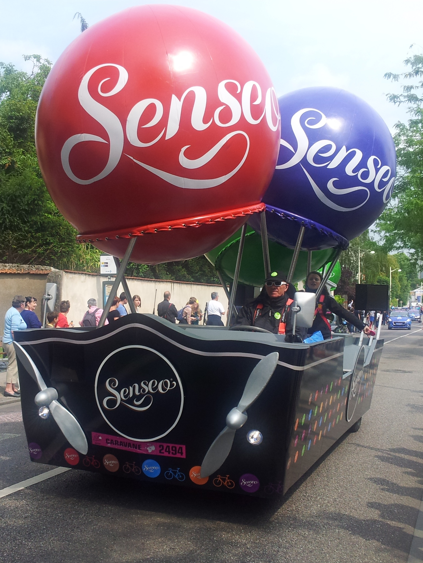 Véhicule de la caravane du Tour de France 2014 dans la côte de Boufflers à Nancy (7e étape).